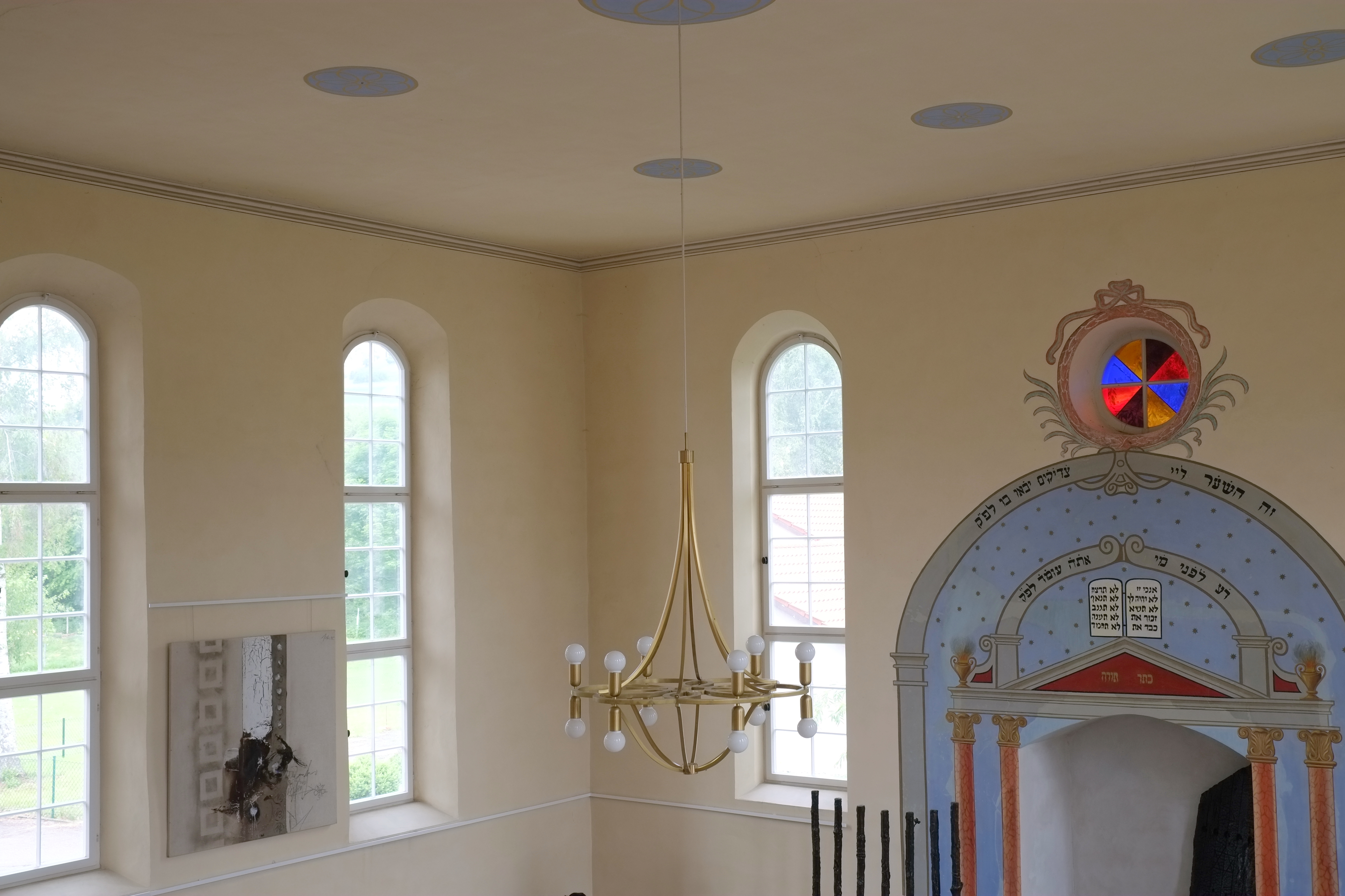 Synagoge in Oberdorf am Ipf im Ostalbkreis (Baden-Württemberg)